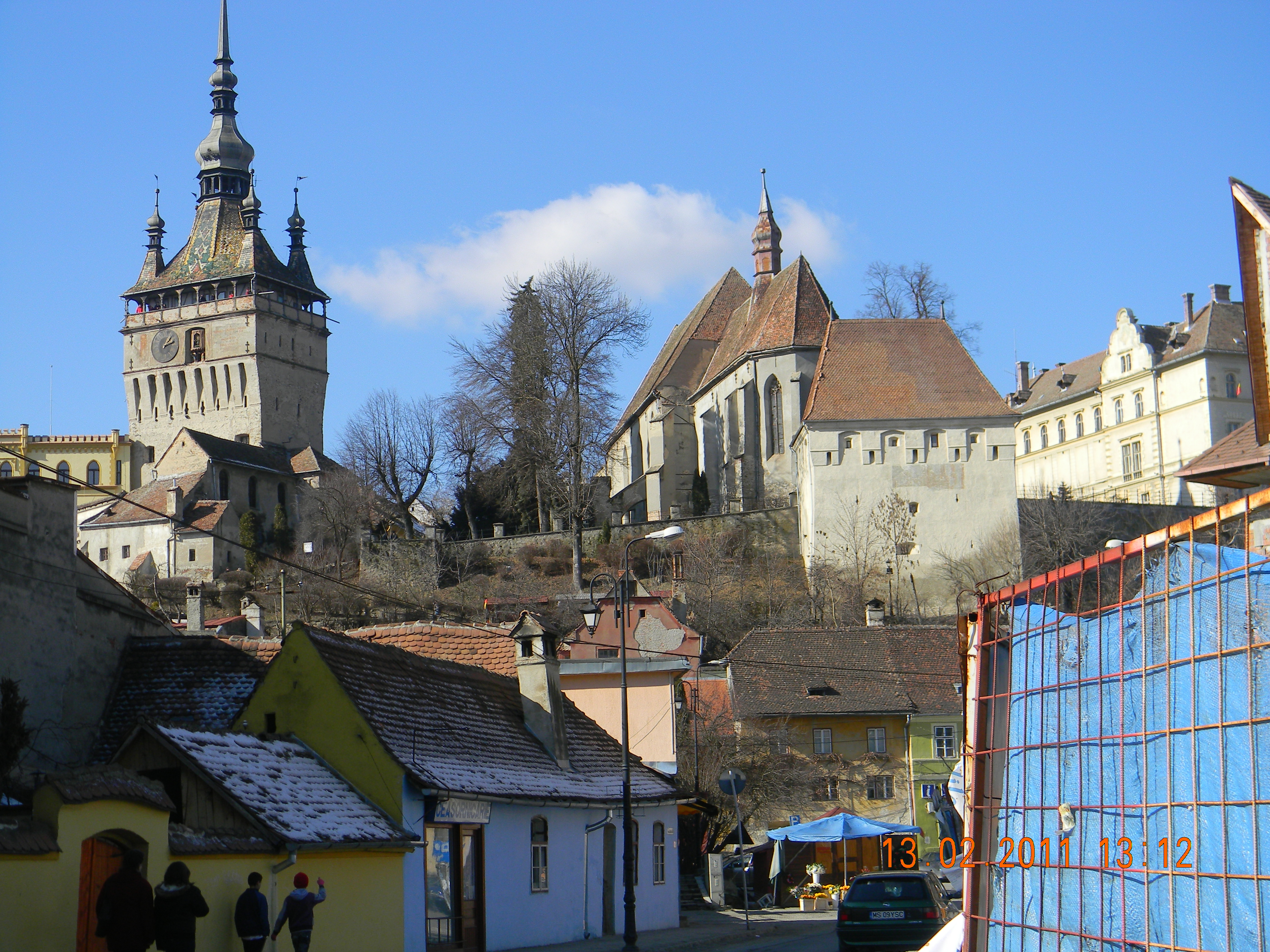 dealul fortificat al cetatii medievale